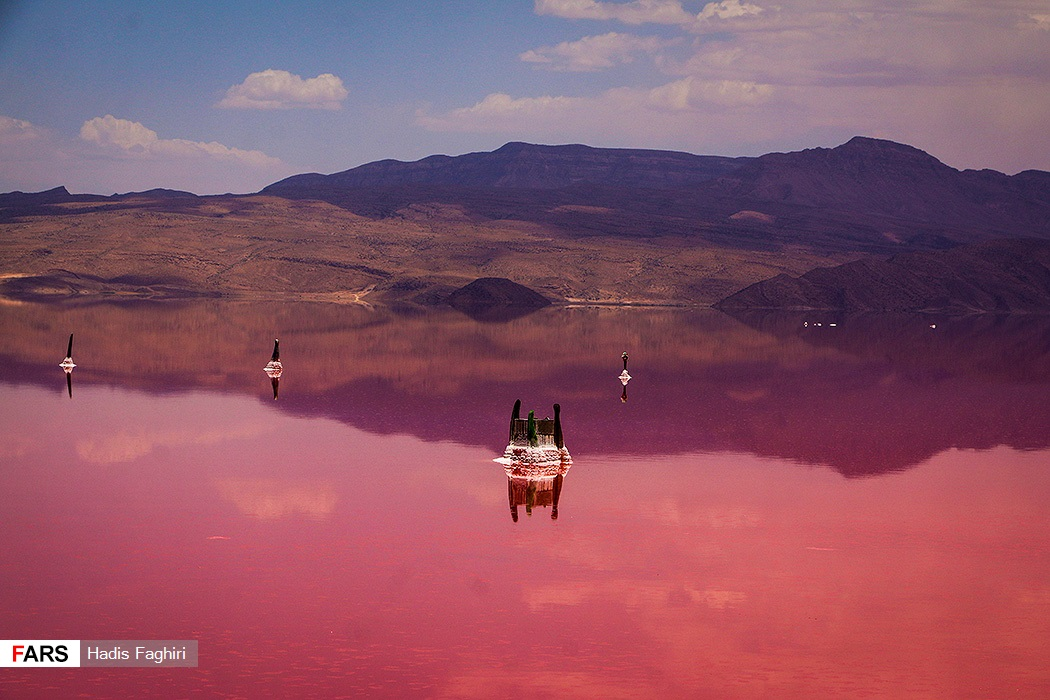 کِشَنْدِ سرخ در دریاچهٔ مَهارلو